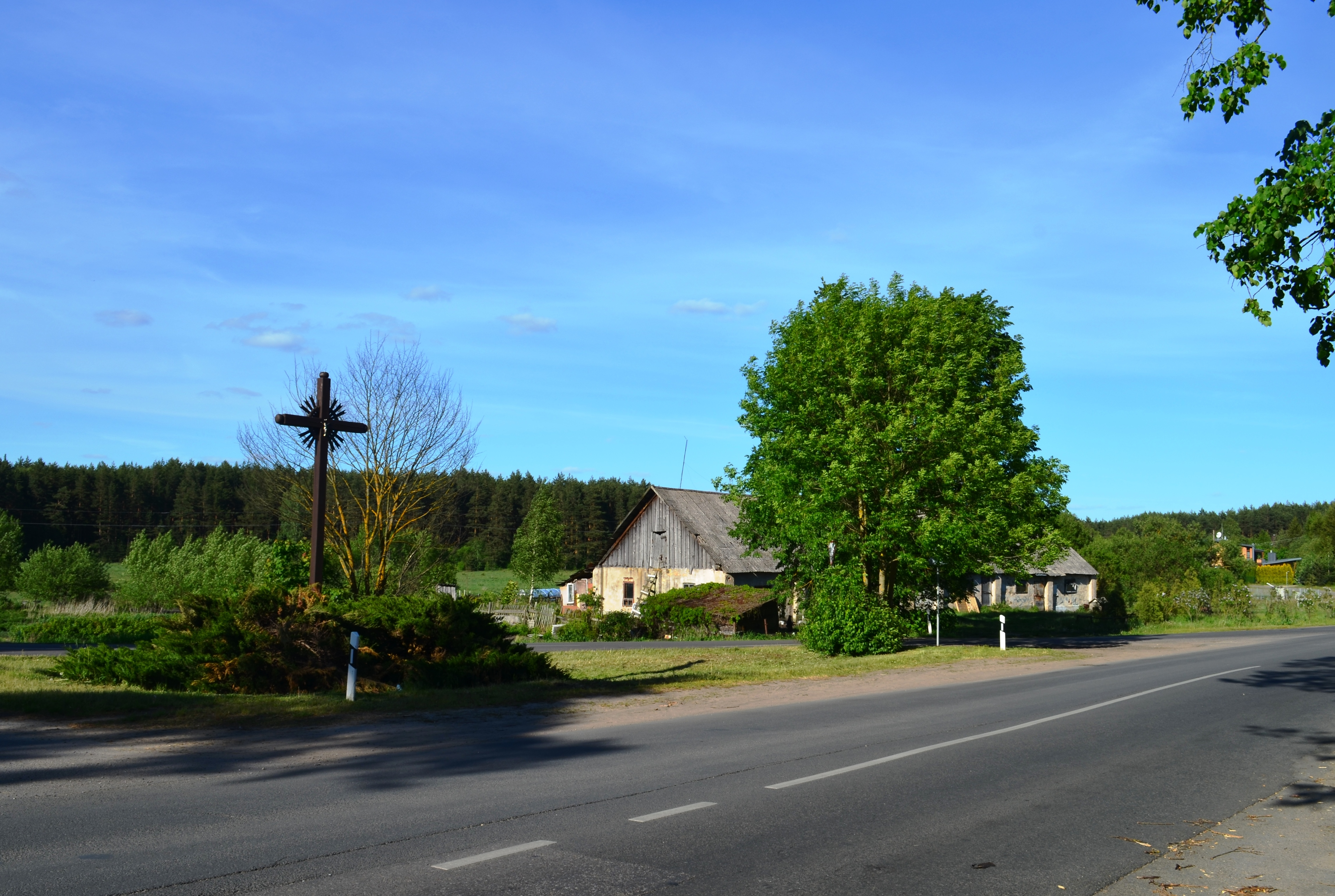 Kryžius Kairėnuose, Vilnius